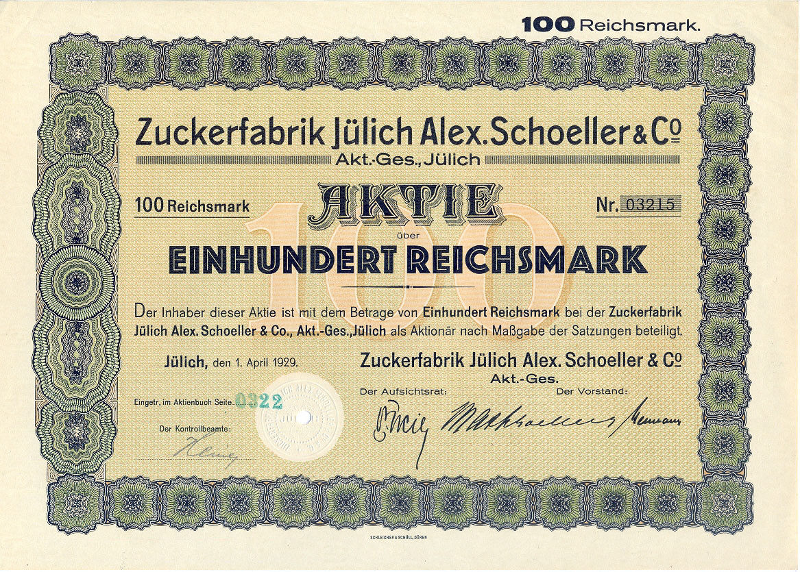 Aktie der Zuckerfabrik Jülich von 1929, aus eigener Sammlung